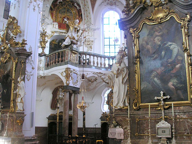 Wallfahrtskirche St. Maria (Andechs, Landkreis Starnberg, Oberbayern). Blick in den Chor. Eigene Aufnahme, Sept. 2006 / Andechs Monastery: Pilgrimage church of St. Mary, (Upper Bavaria, Germany). View into the choir. Own photo, Sept. 2006